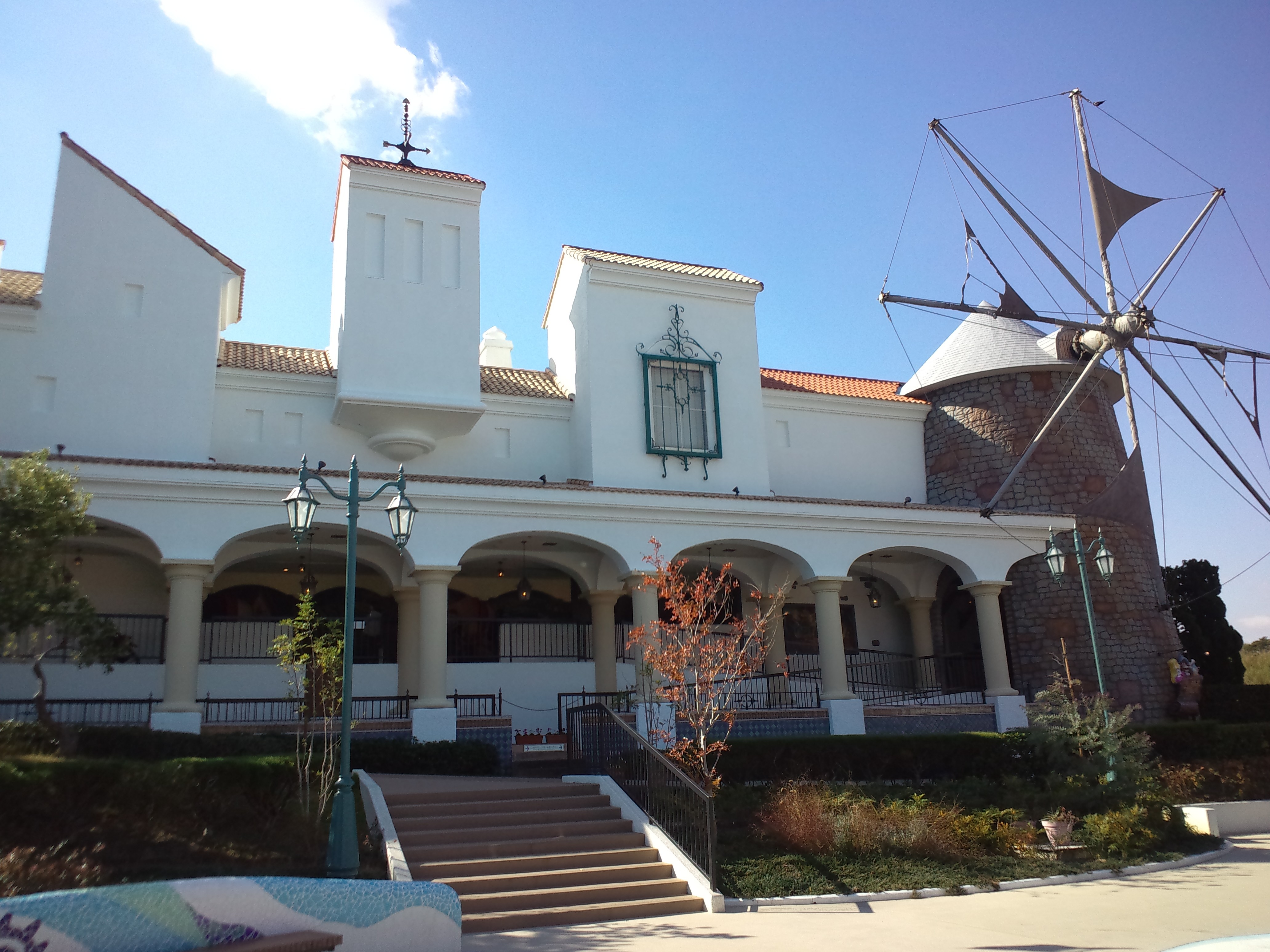 志摩スペイン村、パルケエスパーニャ ドンキホーテ冒険の旅